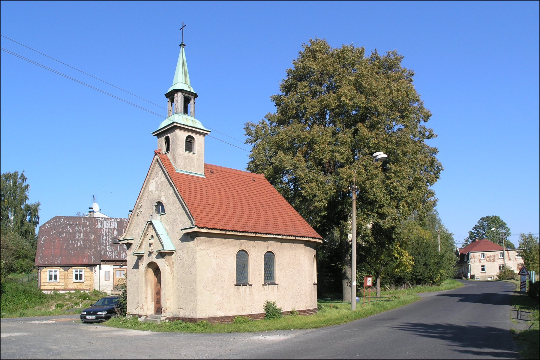 Dolní Křečany - kaplička a památný strom mezi Tovární a Starokřečanskou ulicí